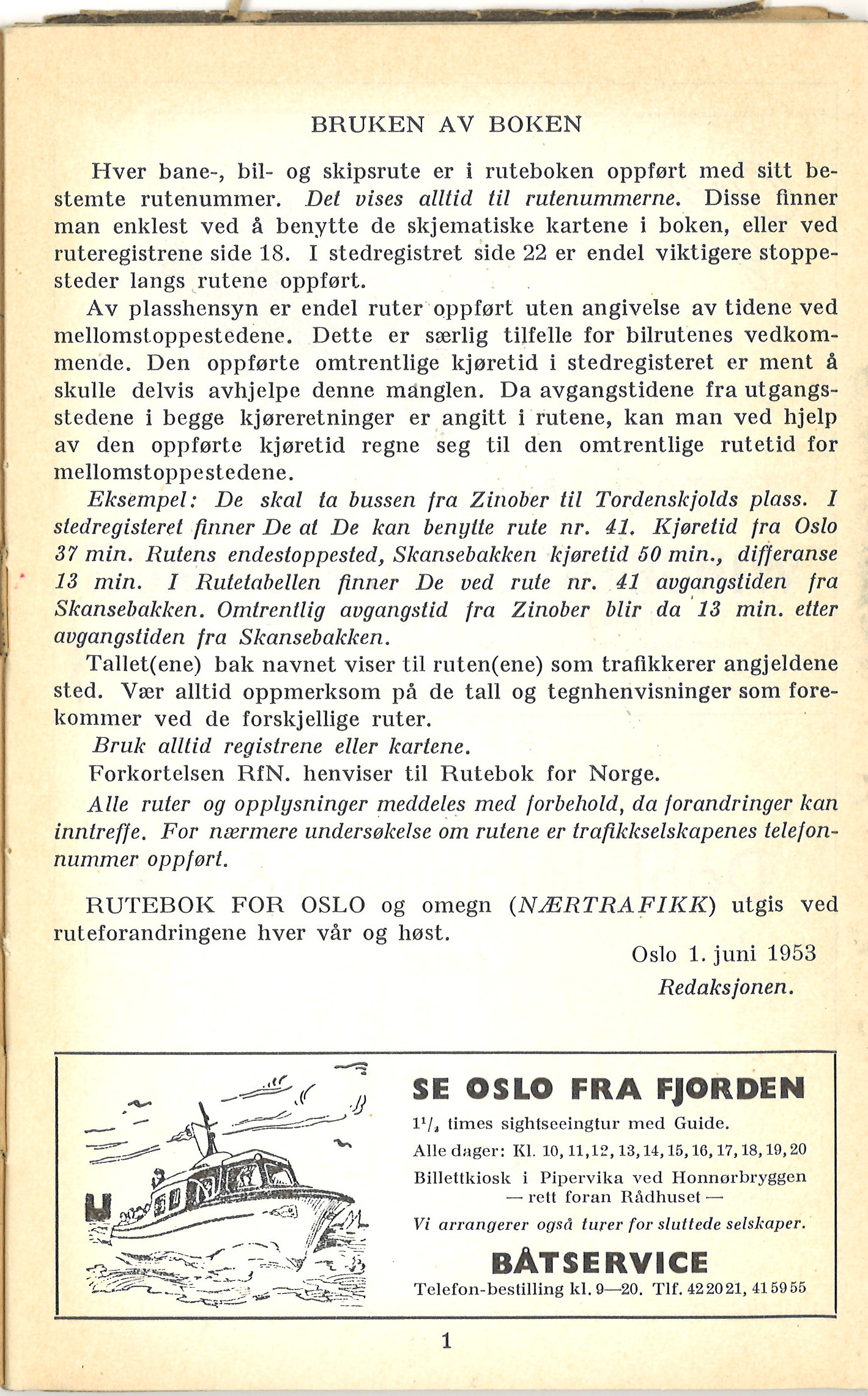 Brukarmanual for Rutebok for Oslo og omegn 1953